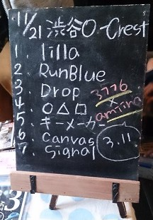 amiinaセトリボード(20151121(1))